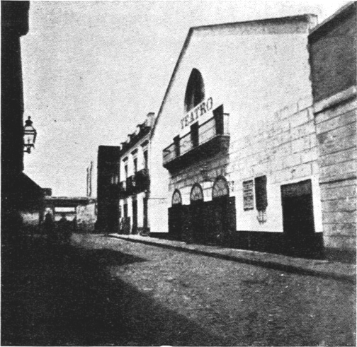 Fotografia de la Casa de Comedias tomada en 1880 poco antes de su demolición.